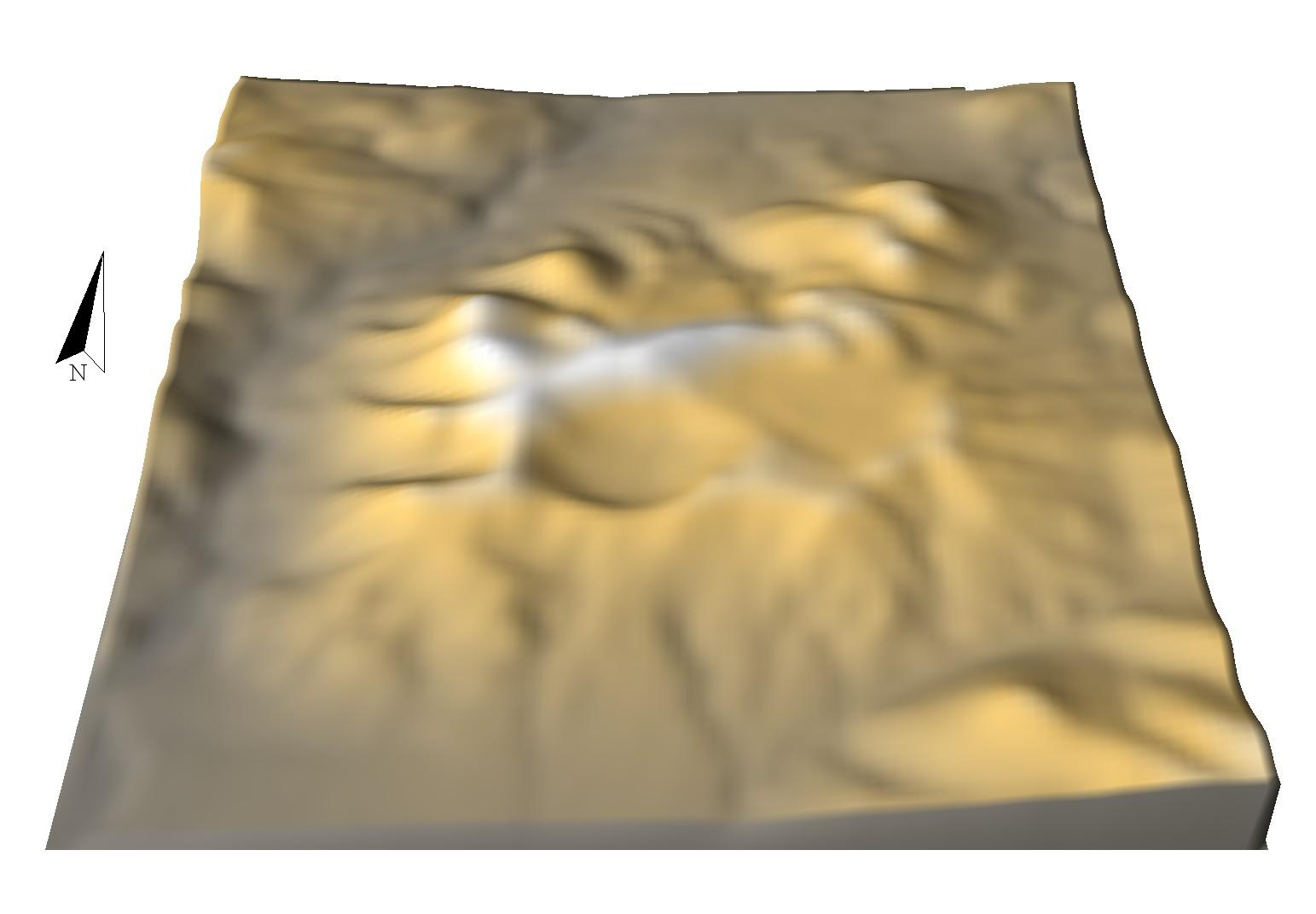 Relieful din zona Lacului Sfânta Ana. Imagine obţinută cu date SRTM oferite liber de NASA.